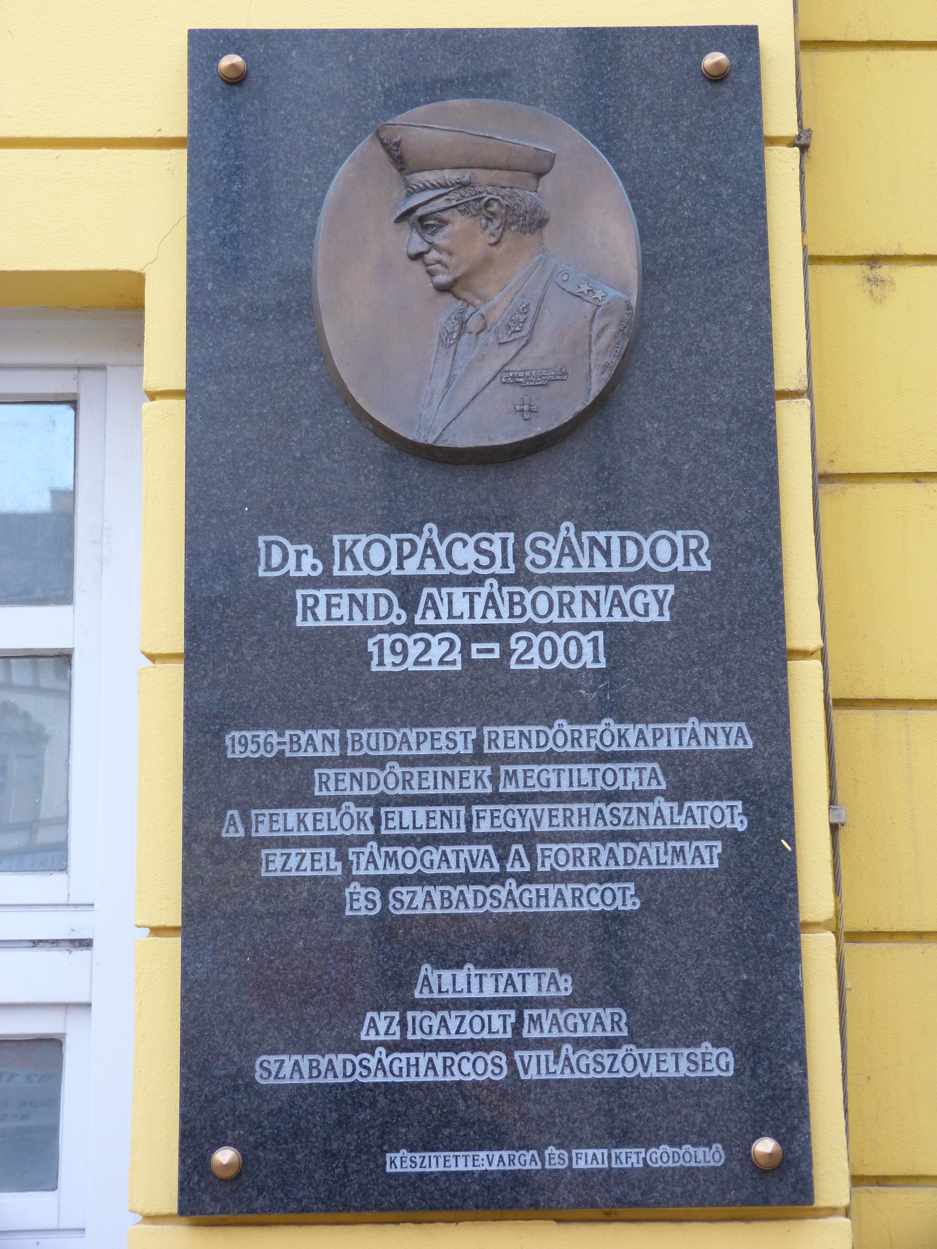 A felvétel 2012. december 5 -én készült Budapesten, a Józsefvárosban. Corvin köz. ©© Published under Creative Commons in the Metapolisz DVD line. All of the photos and vids in the Metapolisz DVD line are under Creative Commons and can be used even for commercial – for profit – purposes. Recommended Citation Derzsi Elekes Andor: Metapolisz DVD line ©© Megjelent Creative Commons alatt a Metapolisz sorozatban. A Metapolisz sorozat valamennyi képe és filmje Creative Commons alatti valamint kereskedelmi - for profit - célra is felhasználható. Ajánlott hivatkozás: Derzsi Elekes Andor: Metapolisz DVD line Másik fénykép ugyanerről a tábláról: File:KopacsiSandor Corvin1.jpg